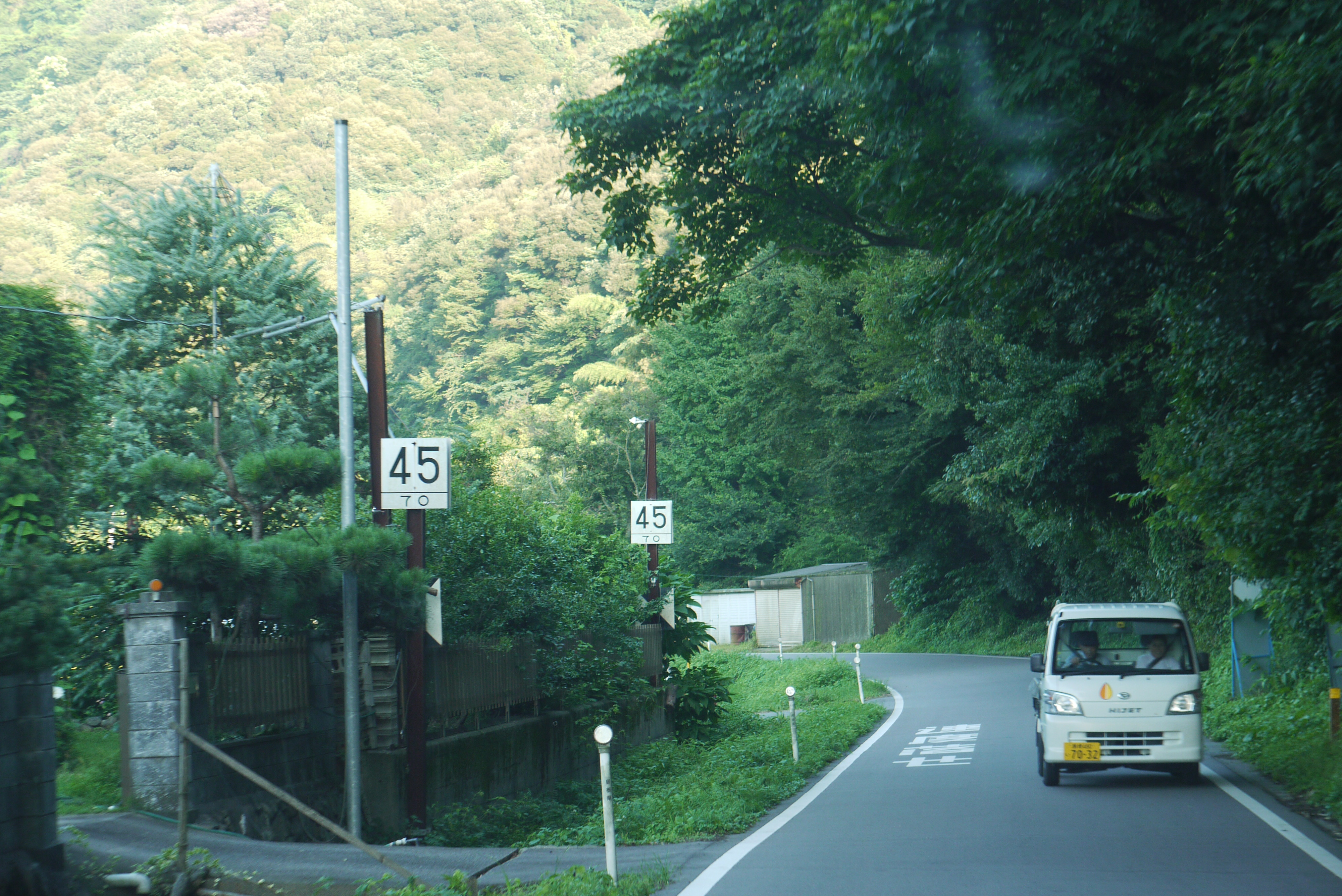 島根県の県道305号線にある鉄道の標識